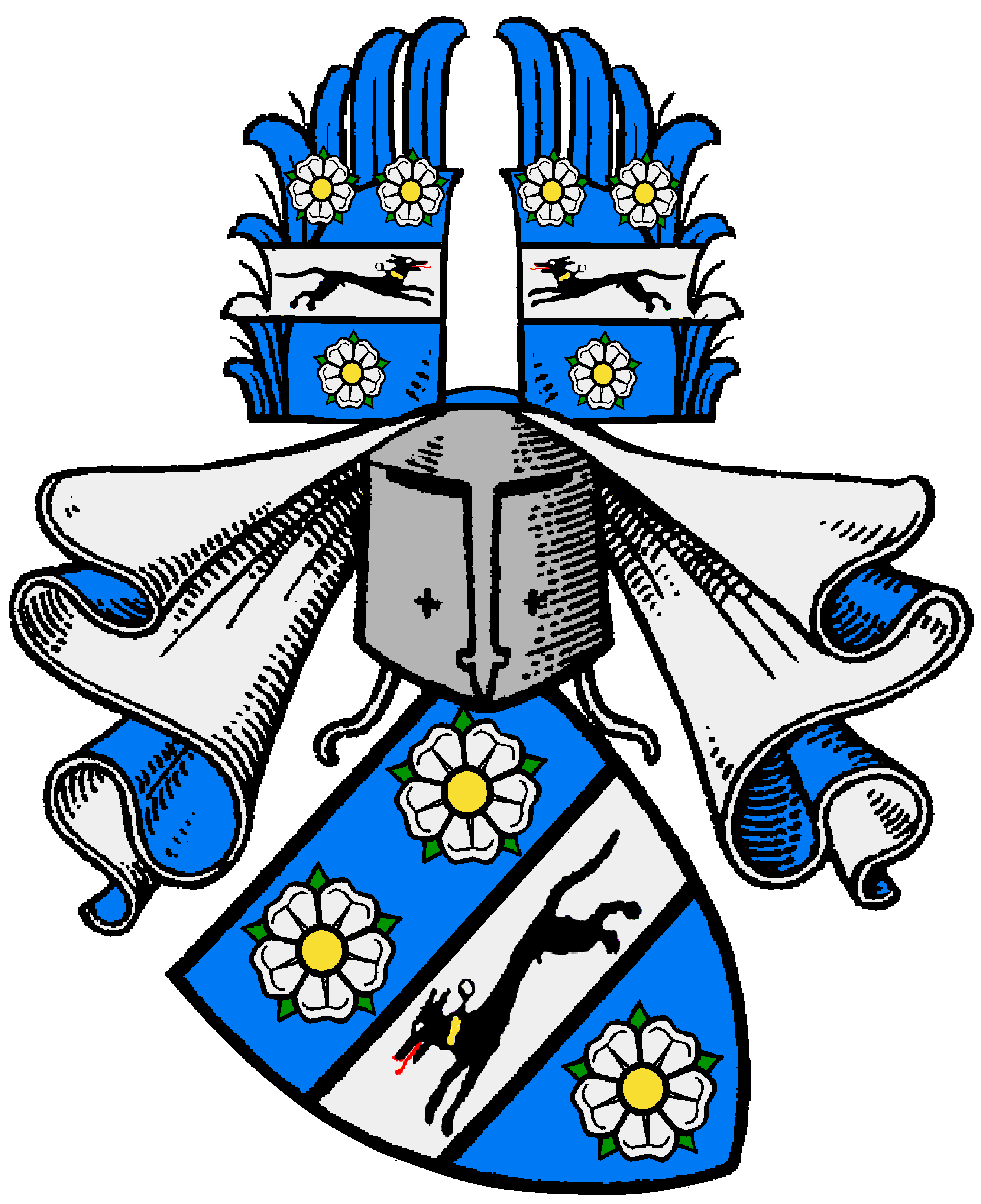 Stammwappen der niedersächsischen Familie von Einem von der südniedersächsischen Hansestadt Einbeck, in deren Stadtadel 1284 Johannes de Eynem als Ratsherr zuerst urkundlich genannt wird.